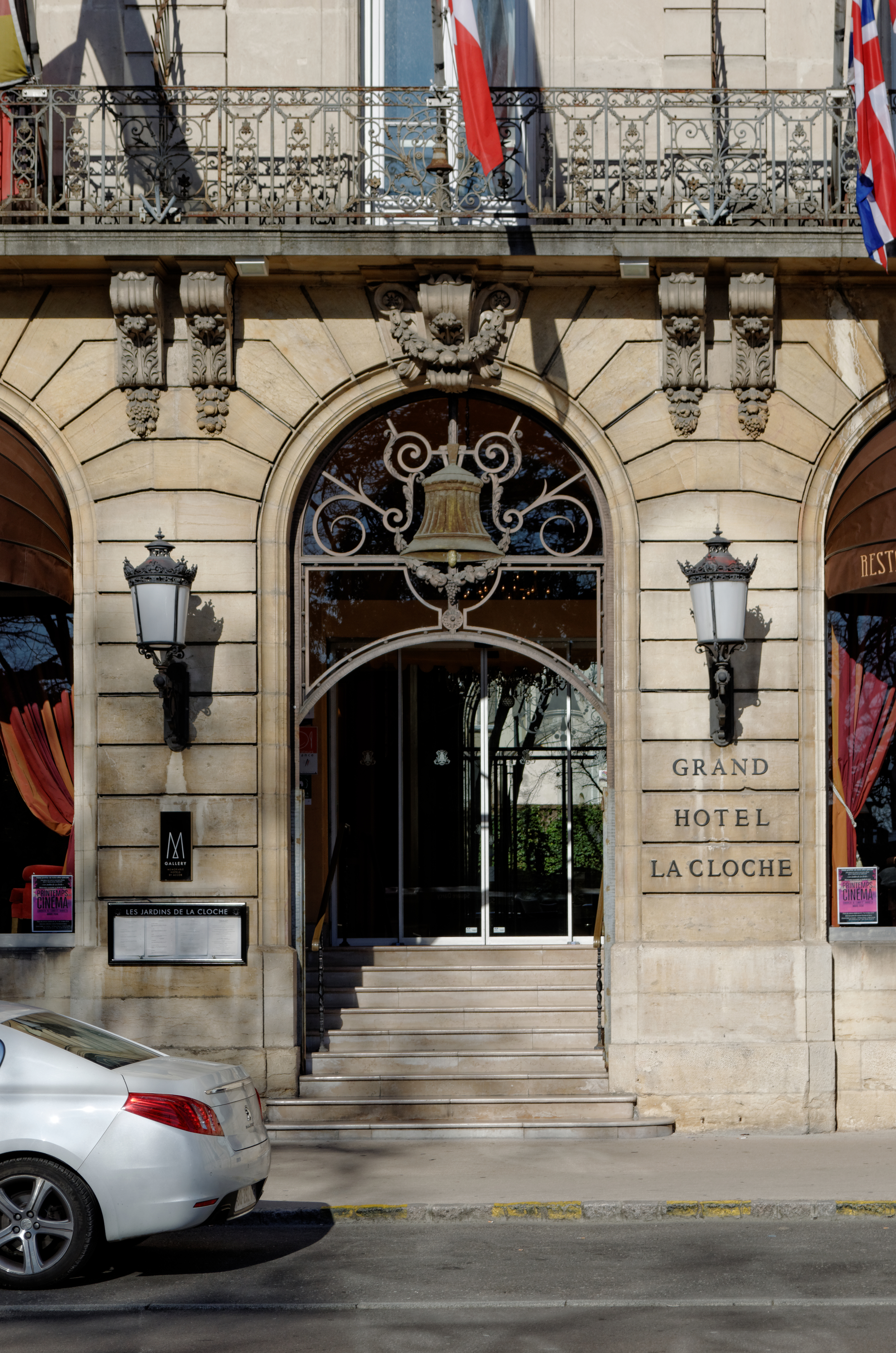 Porte du Grand hôtel la cloche, place Darcy à Dijon (France)